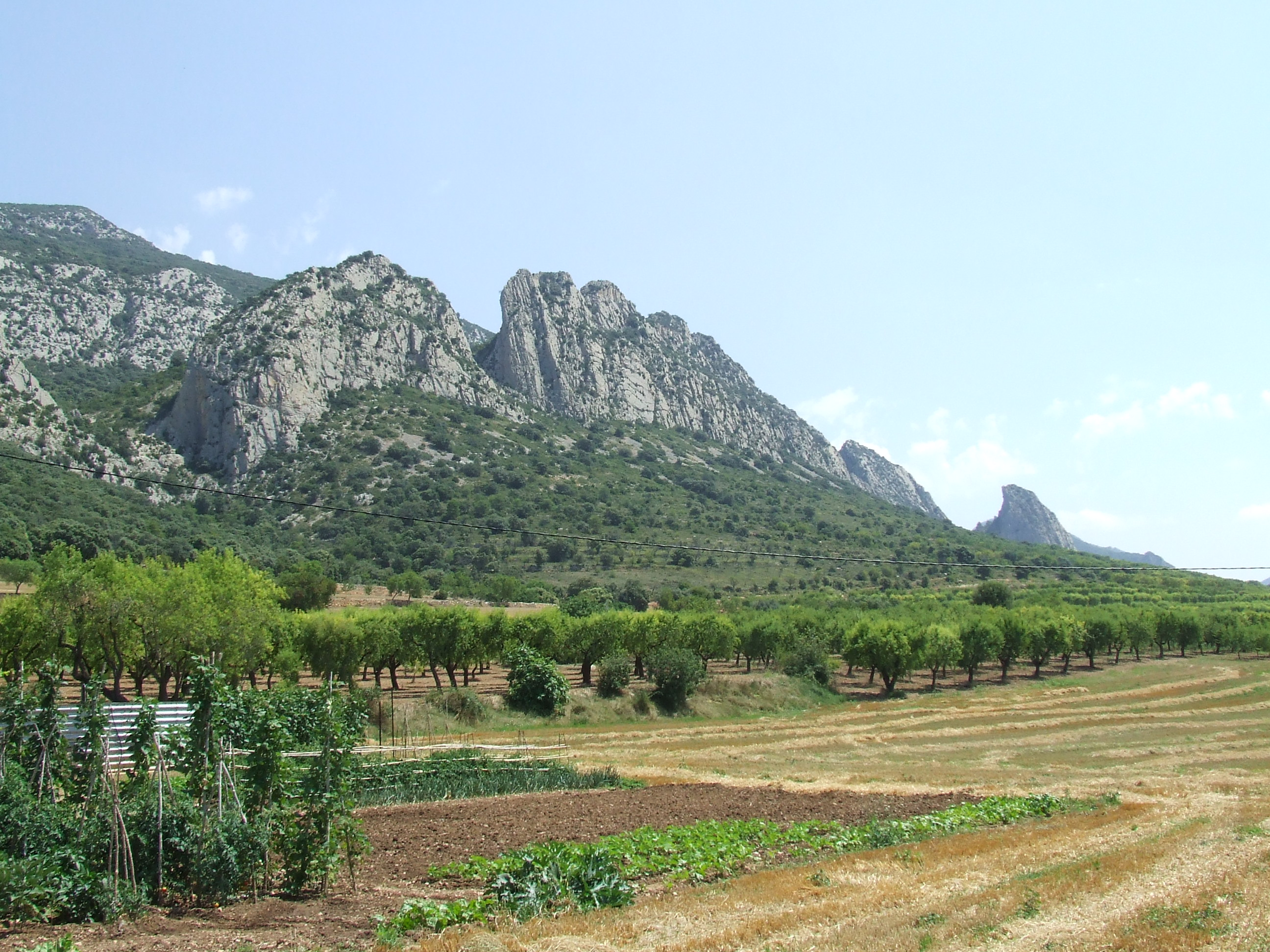 La Roca de Viella (Abella de la Conca, Pallars Jussà)